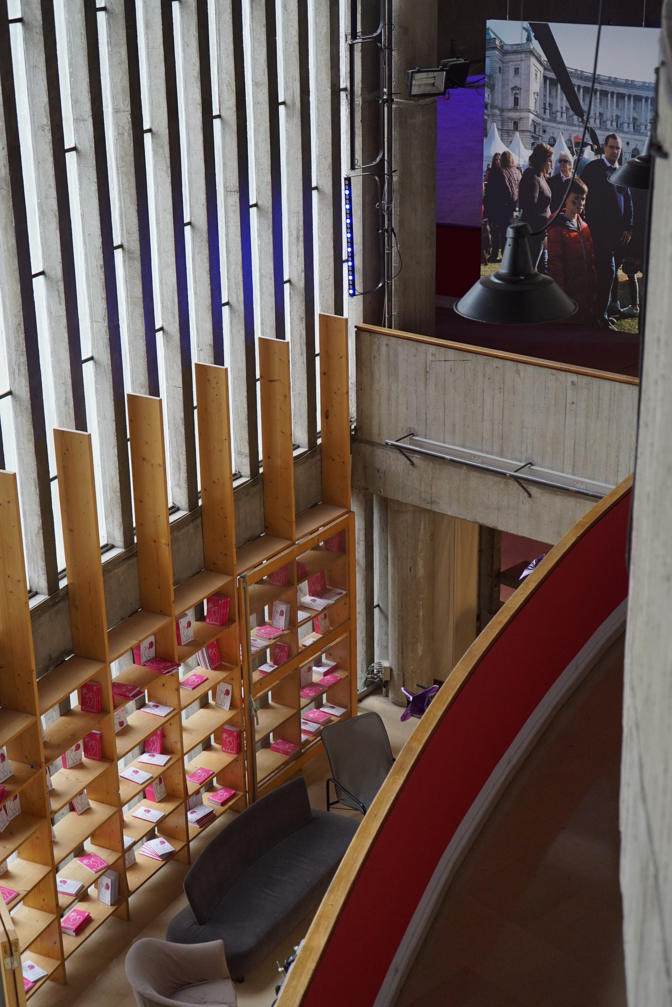 lors de Reims SCènes d'Europe à la Comédie.